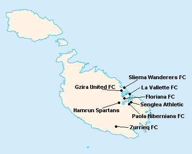 Répartition des clubs en Premier League Maltaise 1981-1982.